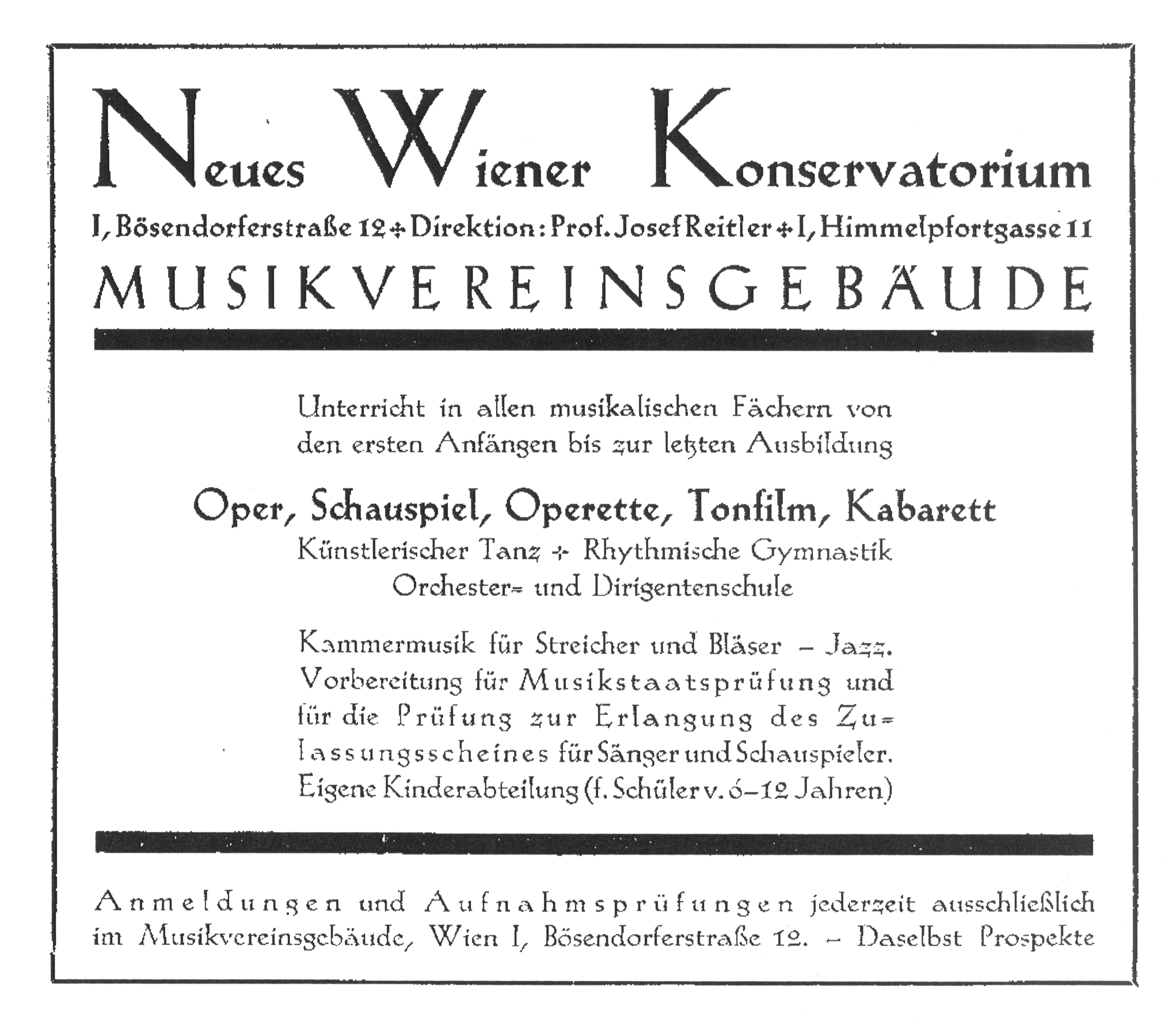 advertisement for Neues Wiener Konservatorium, Vienna